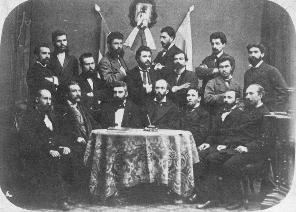 Дейци на БЦБО Димитър М. Свещаров, Петър П. Енчев, Олимпи Панов, Павел Висковски, Иван Кавалджиев, Георги Стойчев, Стефан Атанасов, Христо Златаров, Стефан Стамболов, Иван Вазов, Димитър Иванов, Васил Т. Балтаджиев, Кирияк Цанков, Владимир С. Йонин, Андон Теоханов, Тод...